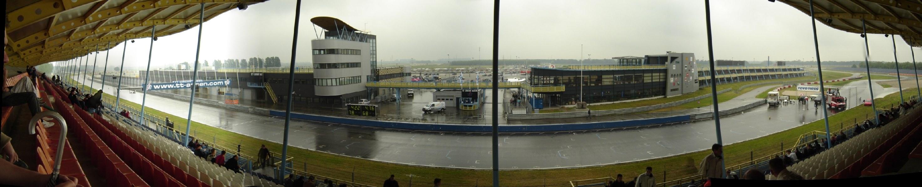 Foto gemaakt door Ra-smit op het circuit van Assen